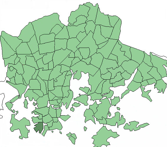 Districts of Helsinki, Jätkäsaari highlighted.